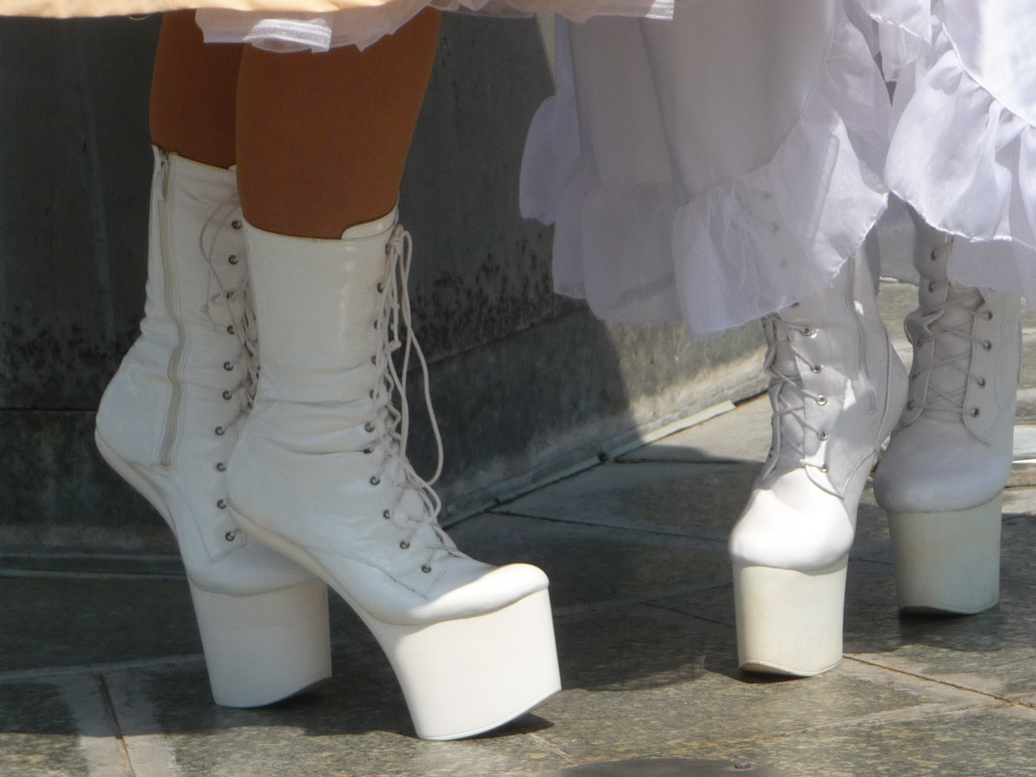 Die Hanami (von jap. 花見 ‚Blüten betrachten‘) ist eine jährlich stattfindende, zweitägige Anime-Convention (Veranstaltung für Manga- und Anime-Fans), welche vom Animexx e.V. veranstaltet wird.